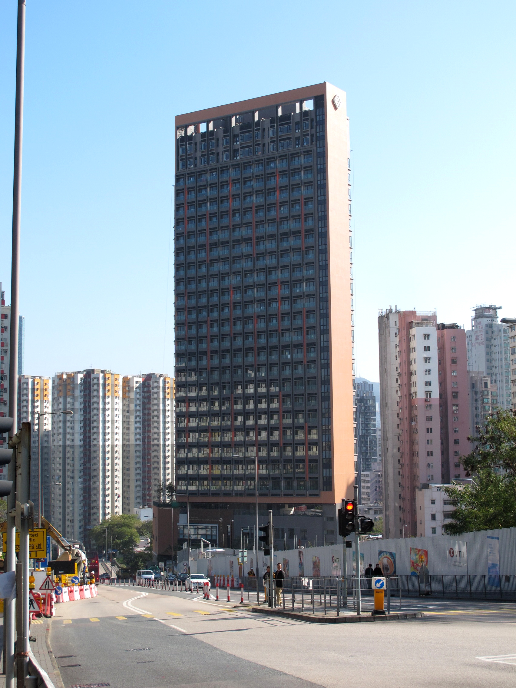 HKPU Student Hostel Phase 3